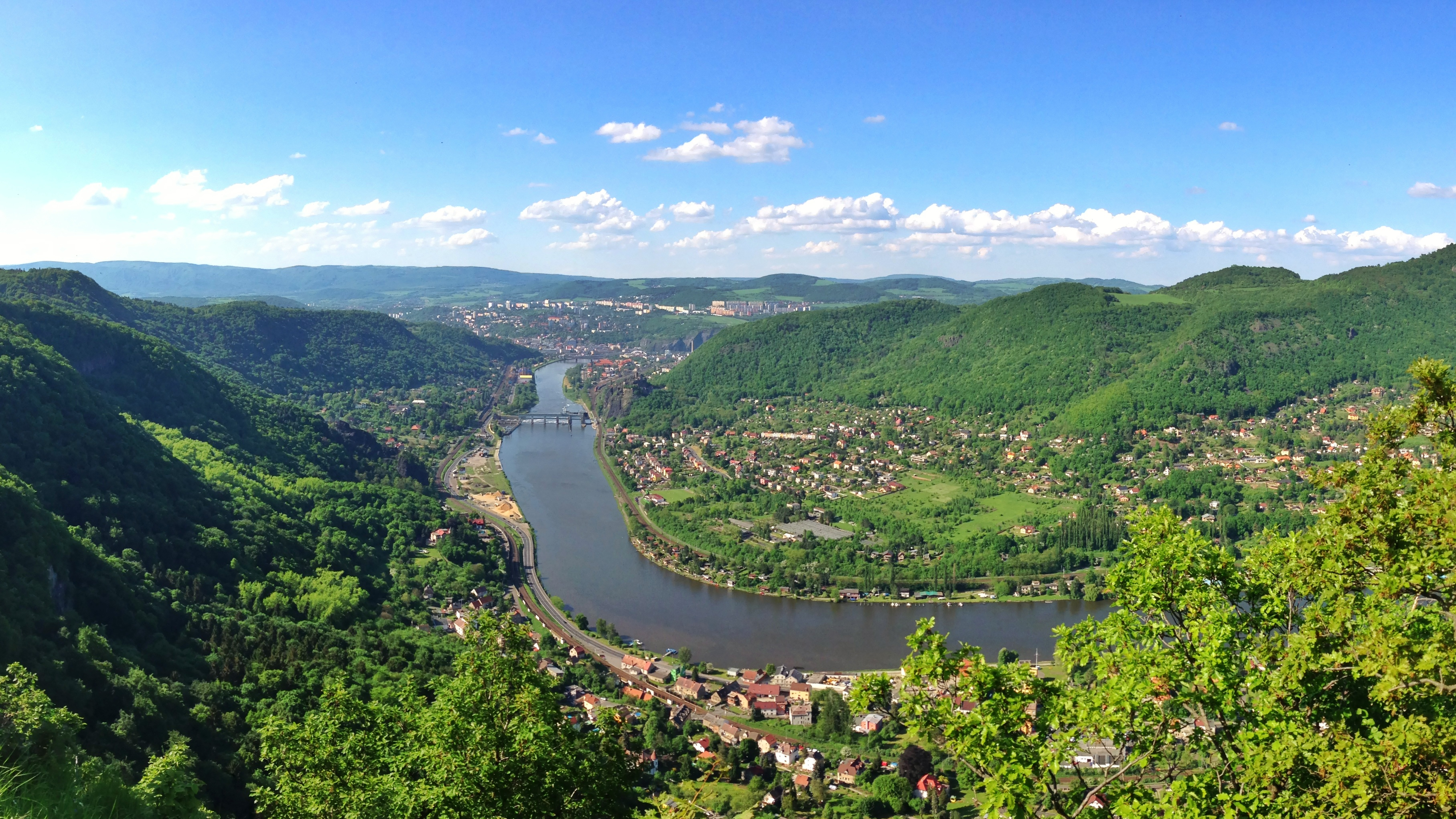 Pohled na labské údolí a Ústí nad Labem z vyhlídky Skály (448 m n. m.) nad Vaňovem. V údolí je patrný Vaňov, část Střekova, hrad Střekov, Masarykova zdymadla a NPP Vrkoč.